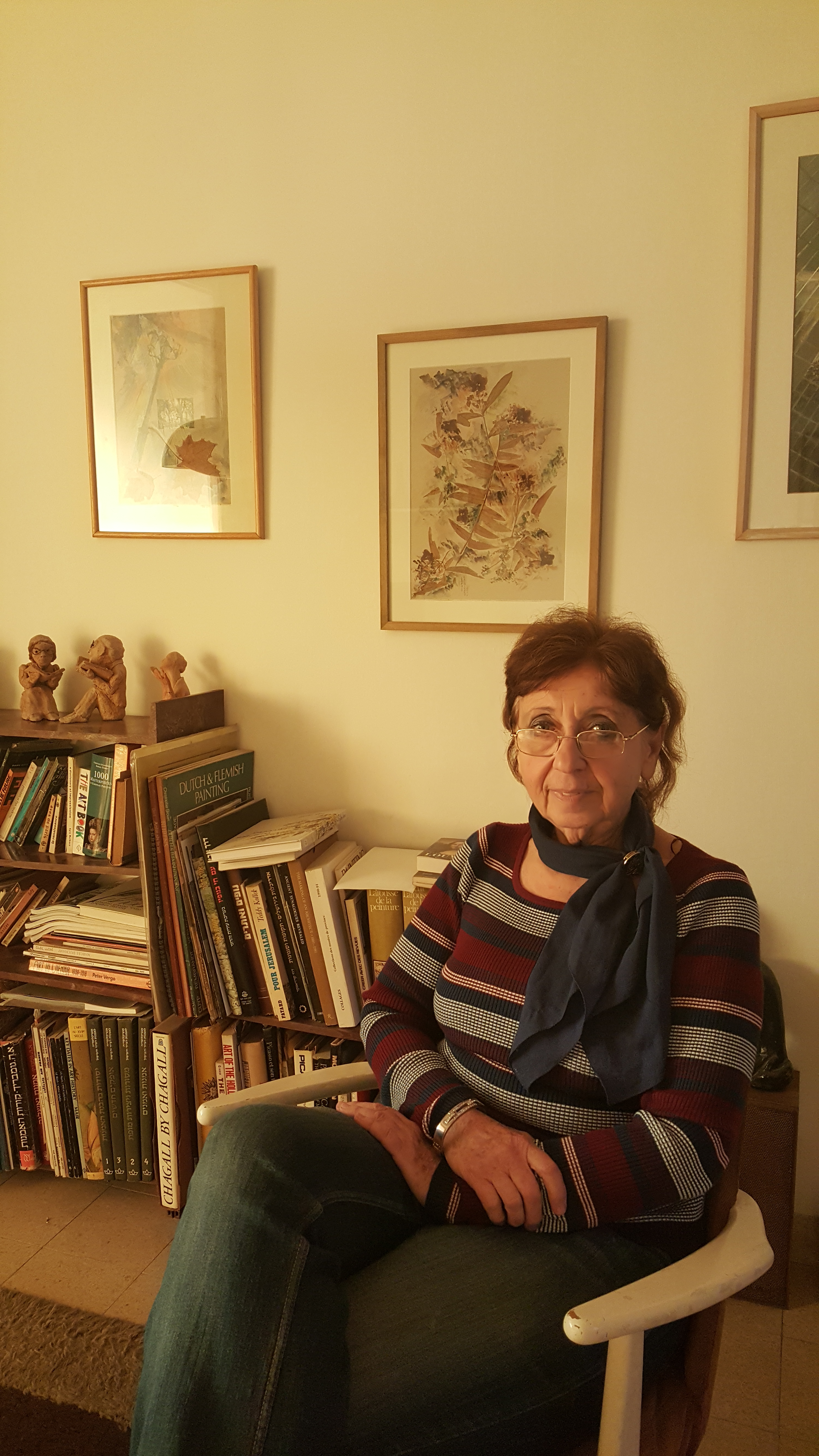 סופי רחלנקו